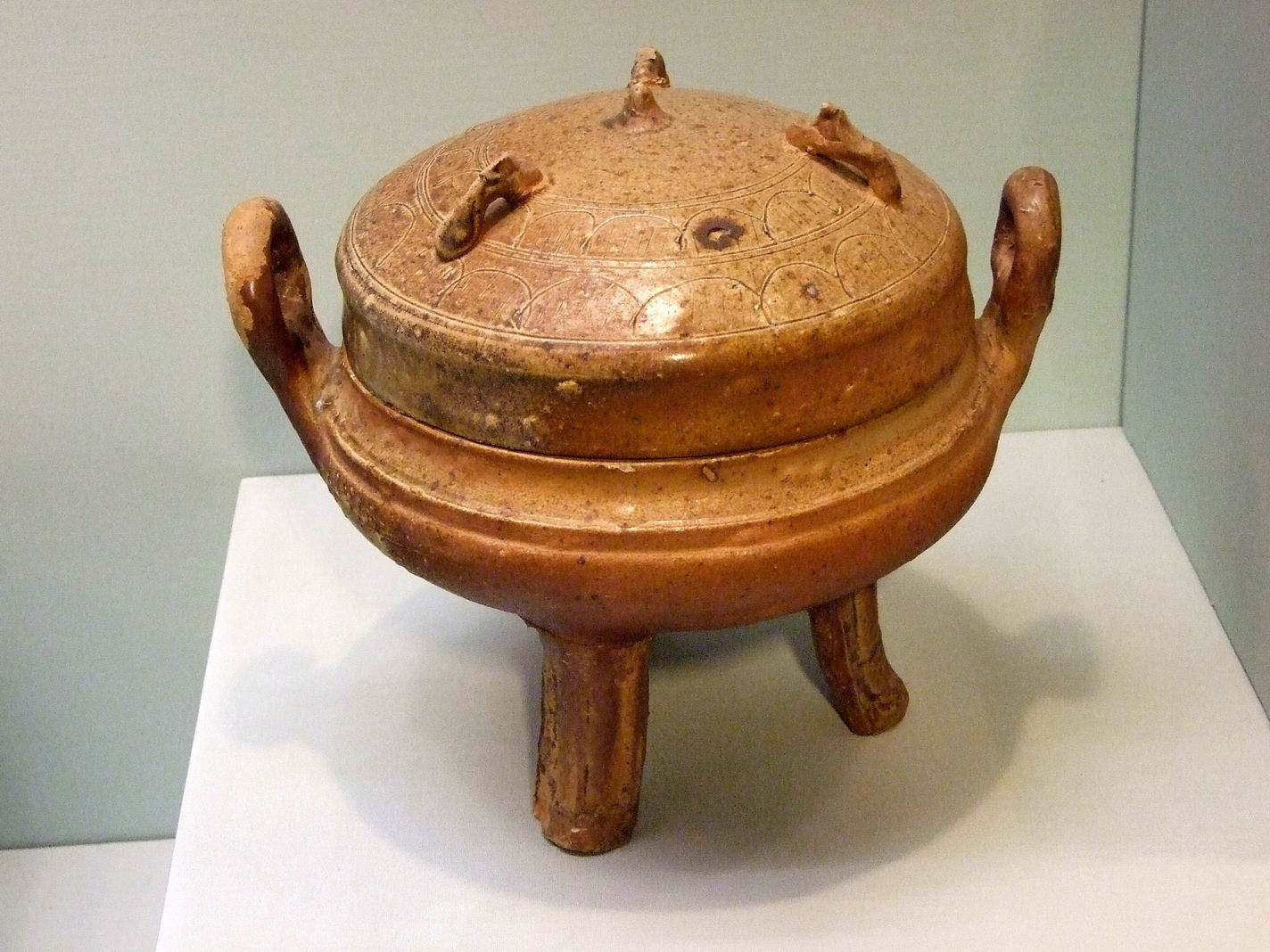 李鄭屋漢墓陶鼎